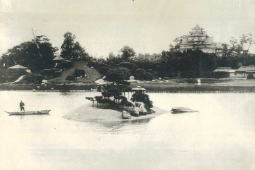 岡山後楽園(Okayama Korakuen Garden)